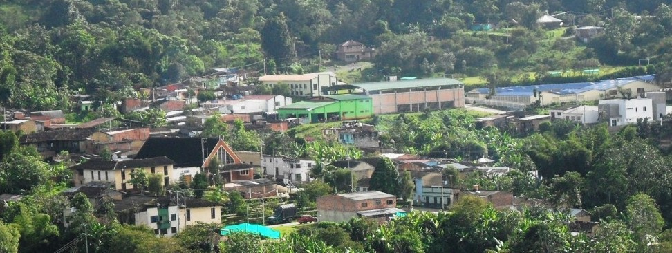 Panorama de Albania